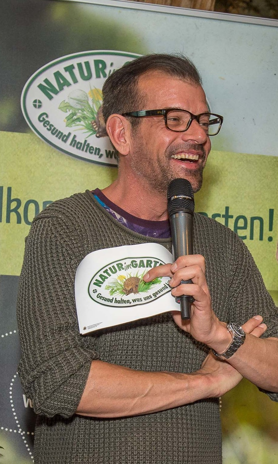 Beim traditionellen Frühlingserwachen der Aktion "Natur im Garten" läuteten Landeshauptfrau Johanna Mikl-Leitner und Landesrat Karl Wilfing die Gartensaison ein.